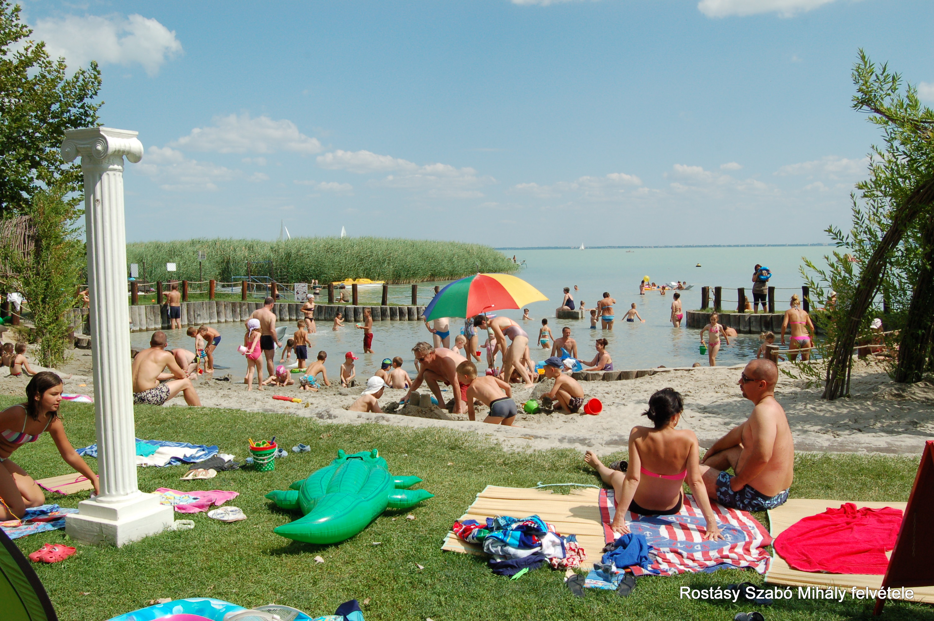 A kisgyermekes családok kedvence